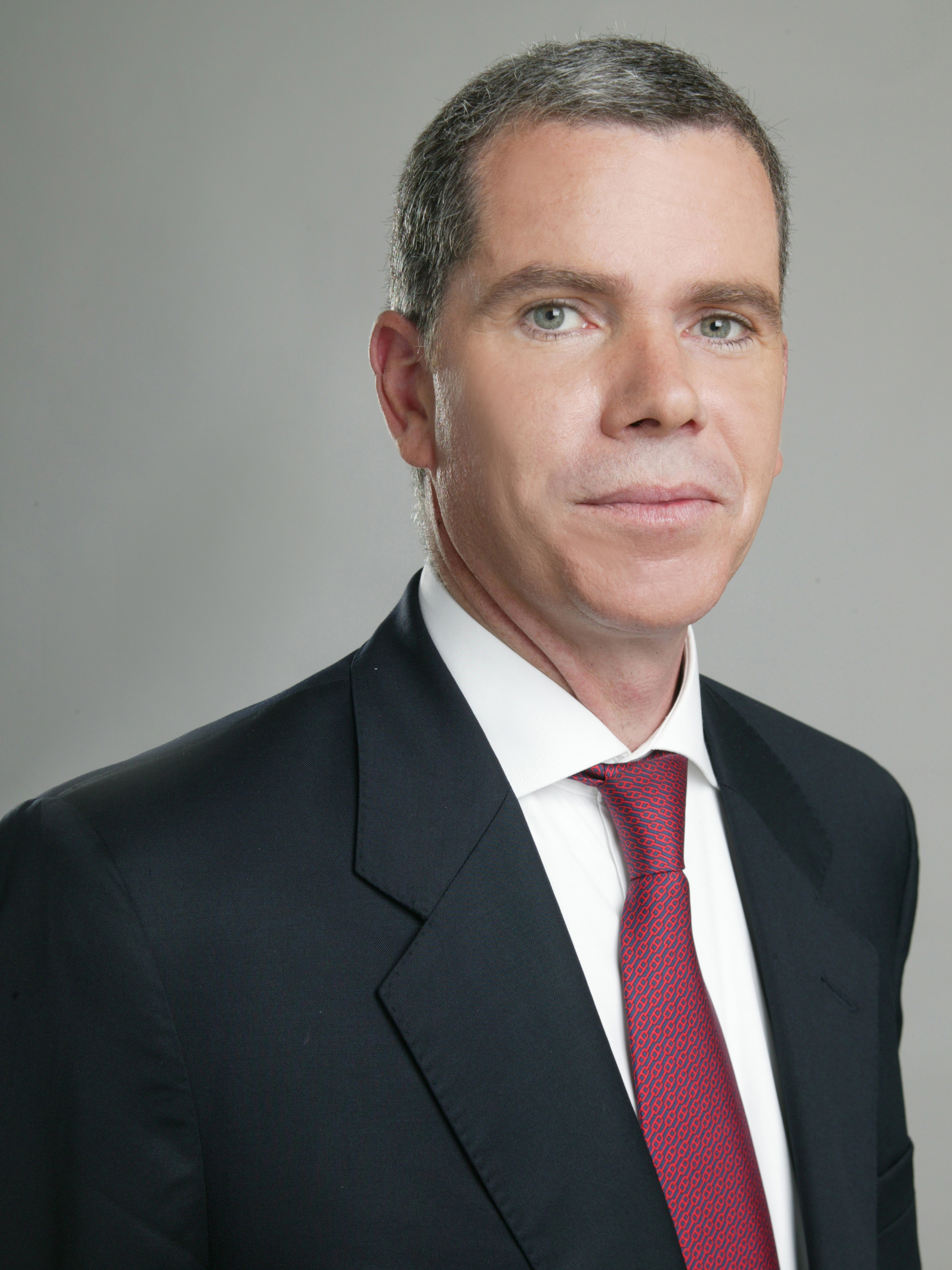 Felipe Bulnes, abogado chileno.